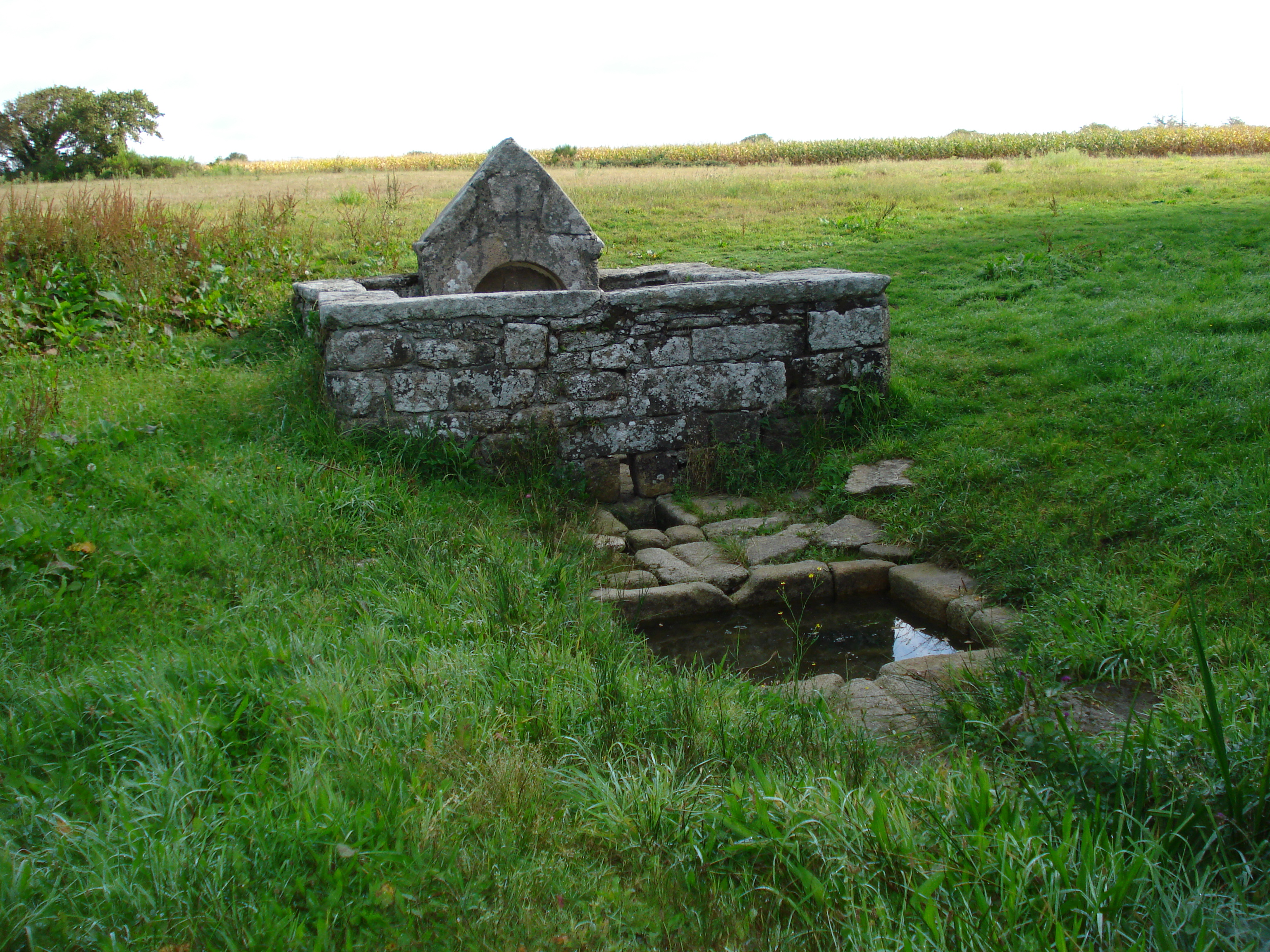 La fontaine St. Côme, Plomeur, Finistère, Bretagne, France